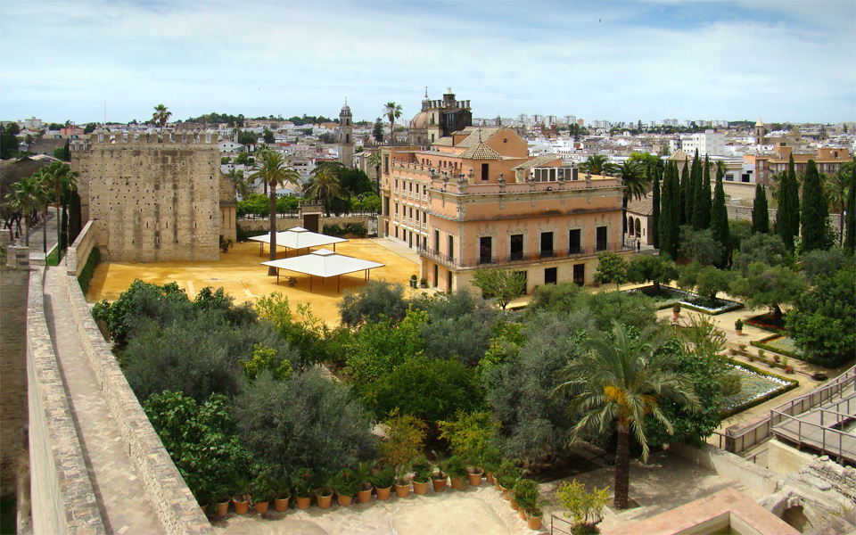 Alcázar de Jerez de la Frontera, Andalucía, España.